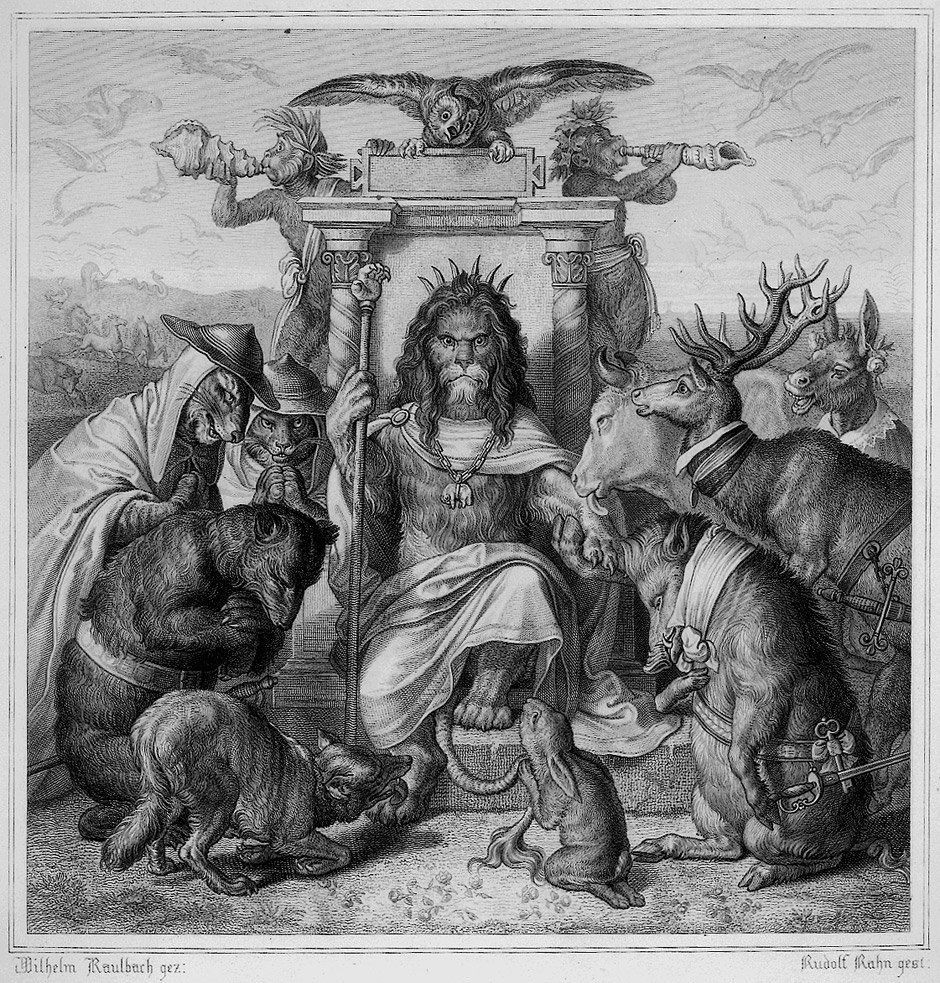 Illustration zu Goethes Reineke Fuchs (Stuttgart und Tübingen, Cotta, 1846.)